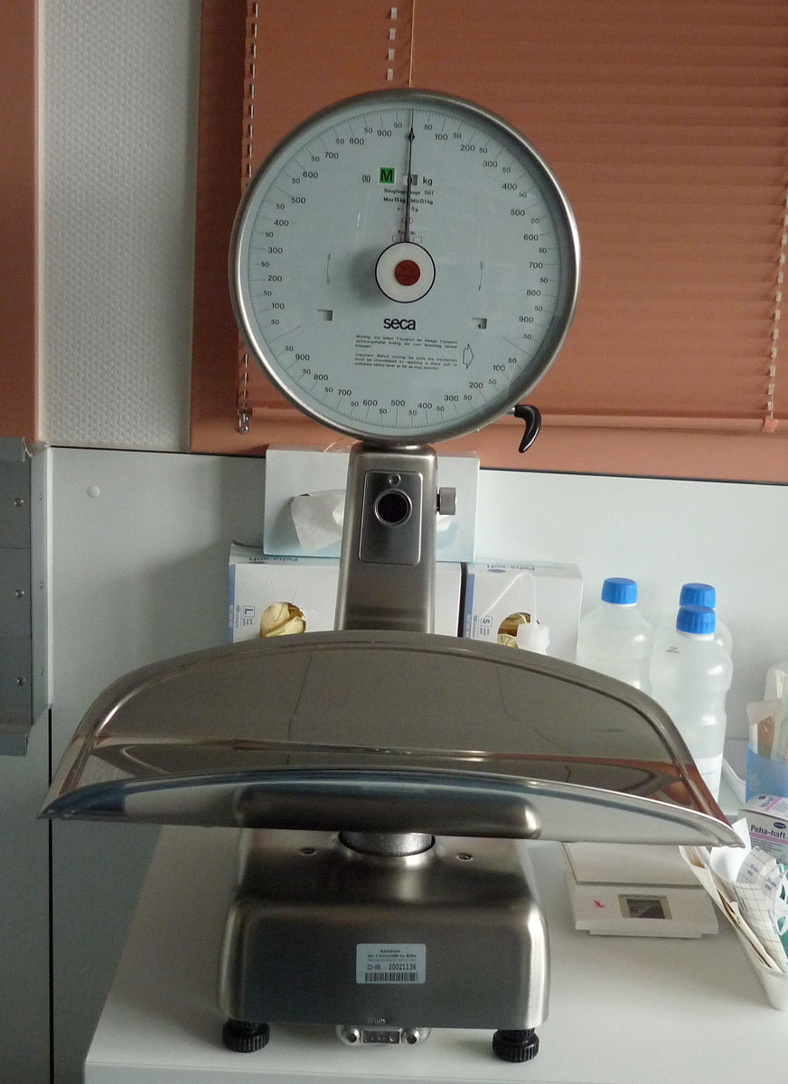 Seca 661, mechanische Säuglingswaage mit grosser Rundskala, Tragkraft 15 kg, Teilung 5 g.